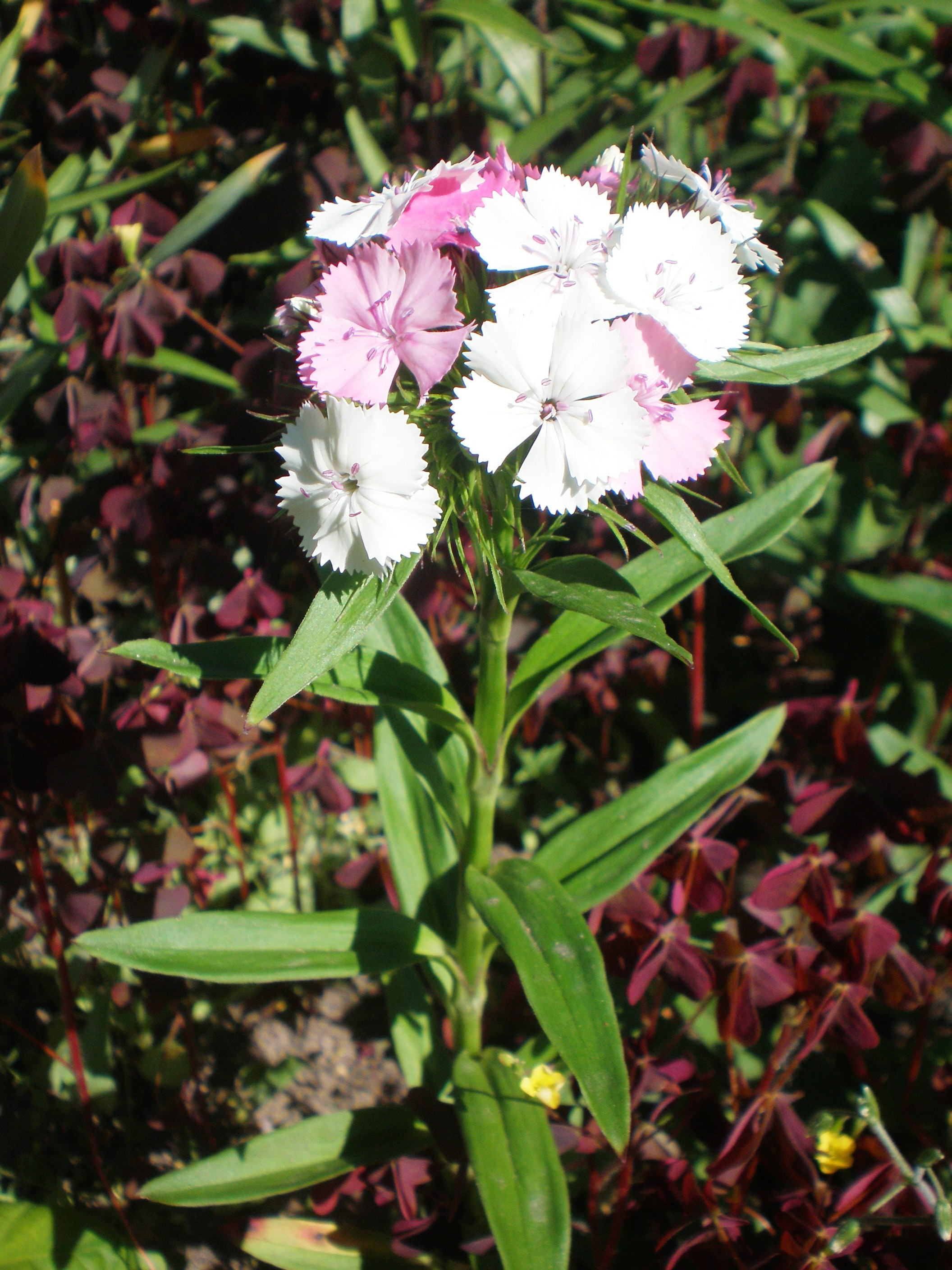 Dianthus barbatus